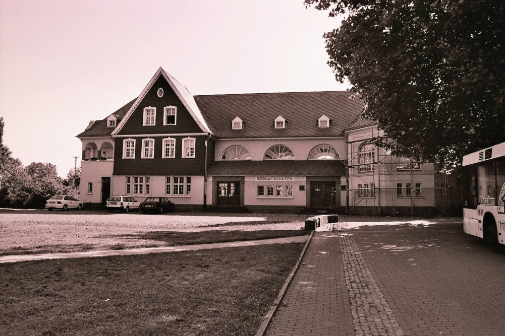 Der Bahnhof von Bochum-Dahlhausen